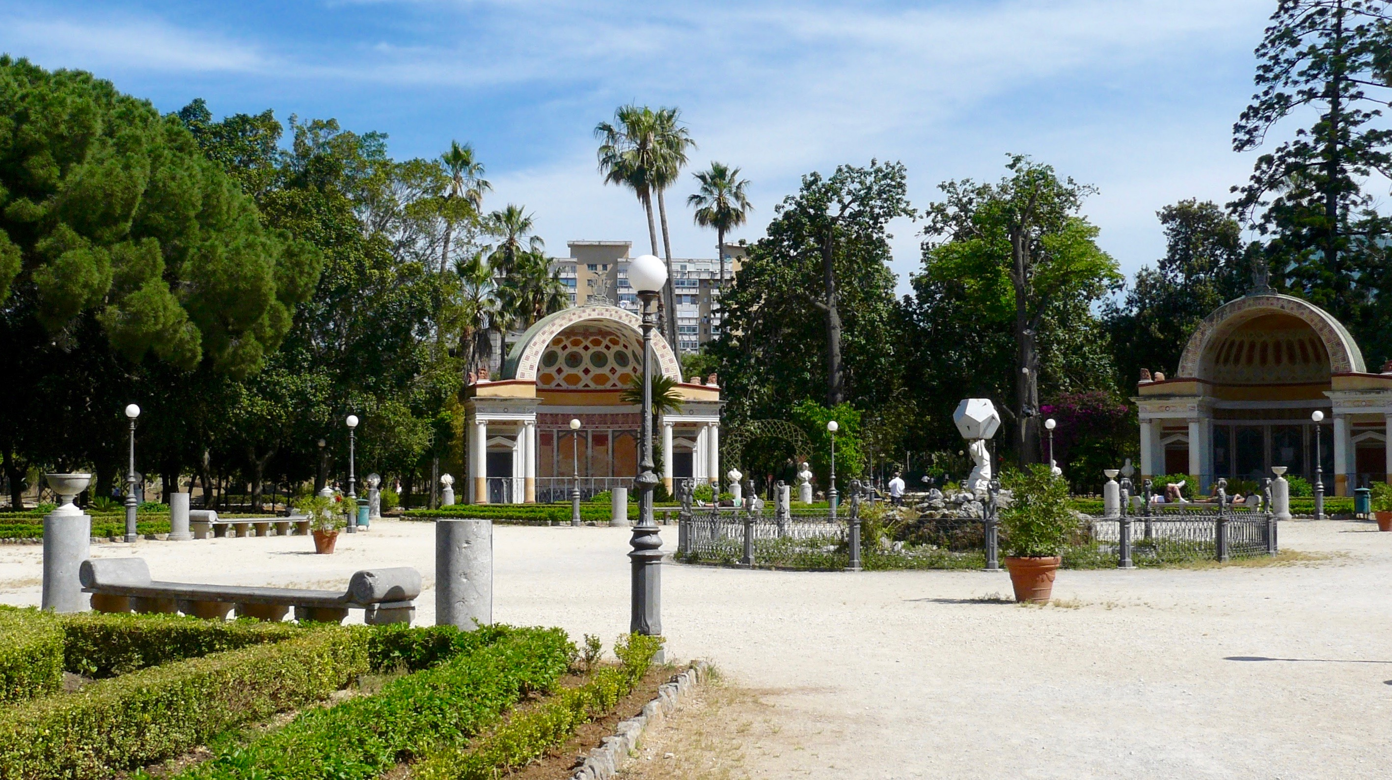 Villa Giulia This is a photo of a monument which is part of cultural heritage of Italy.